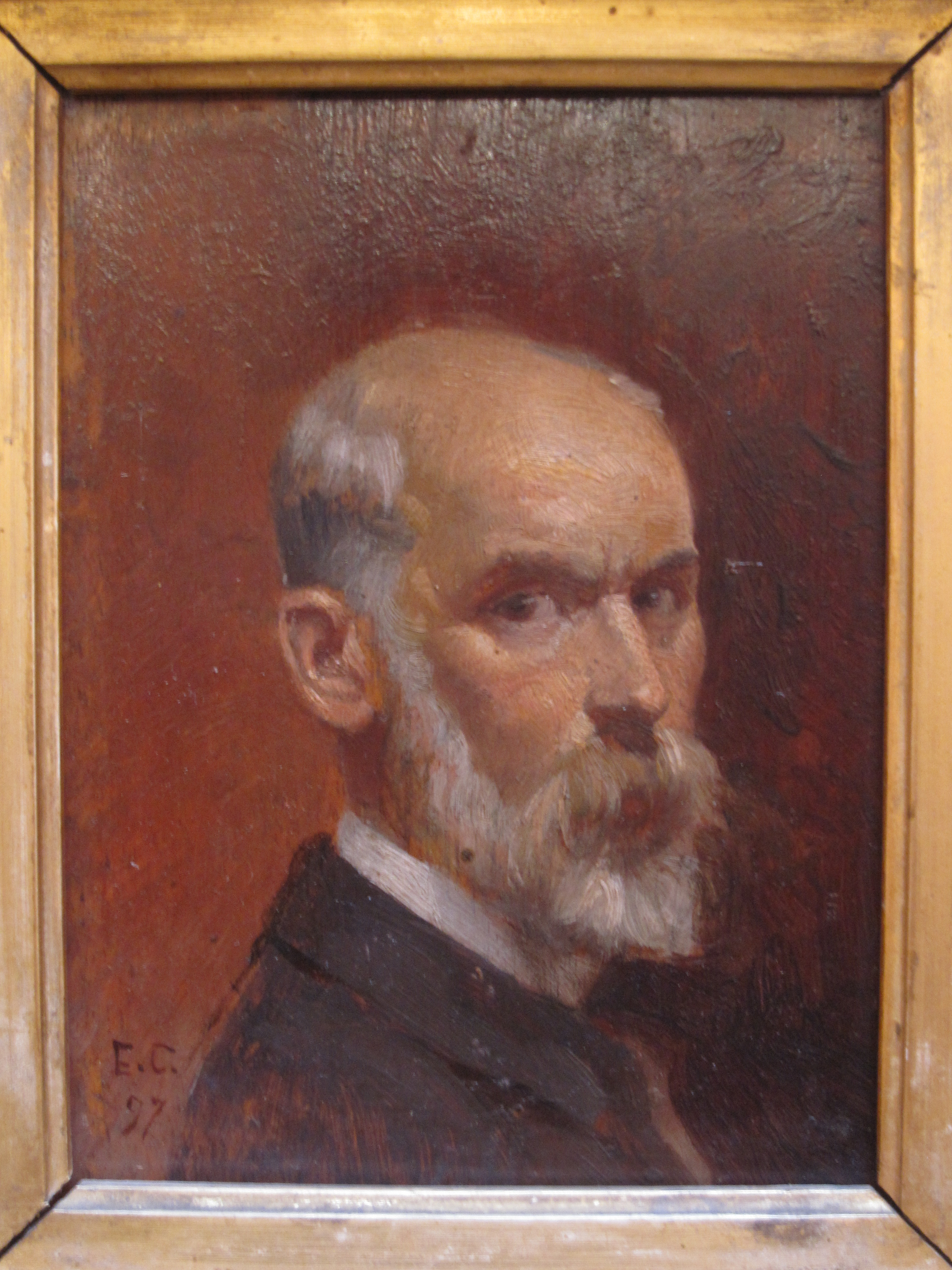 Autoportrait